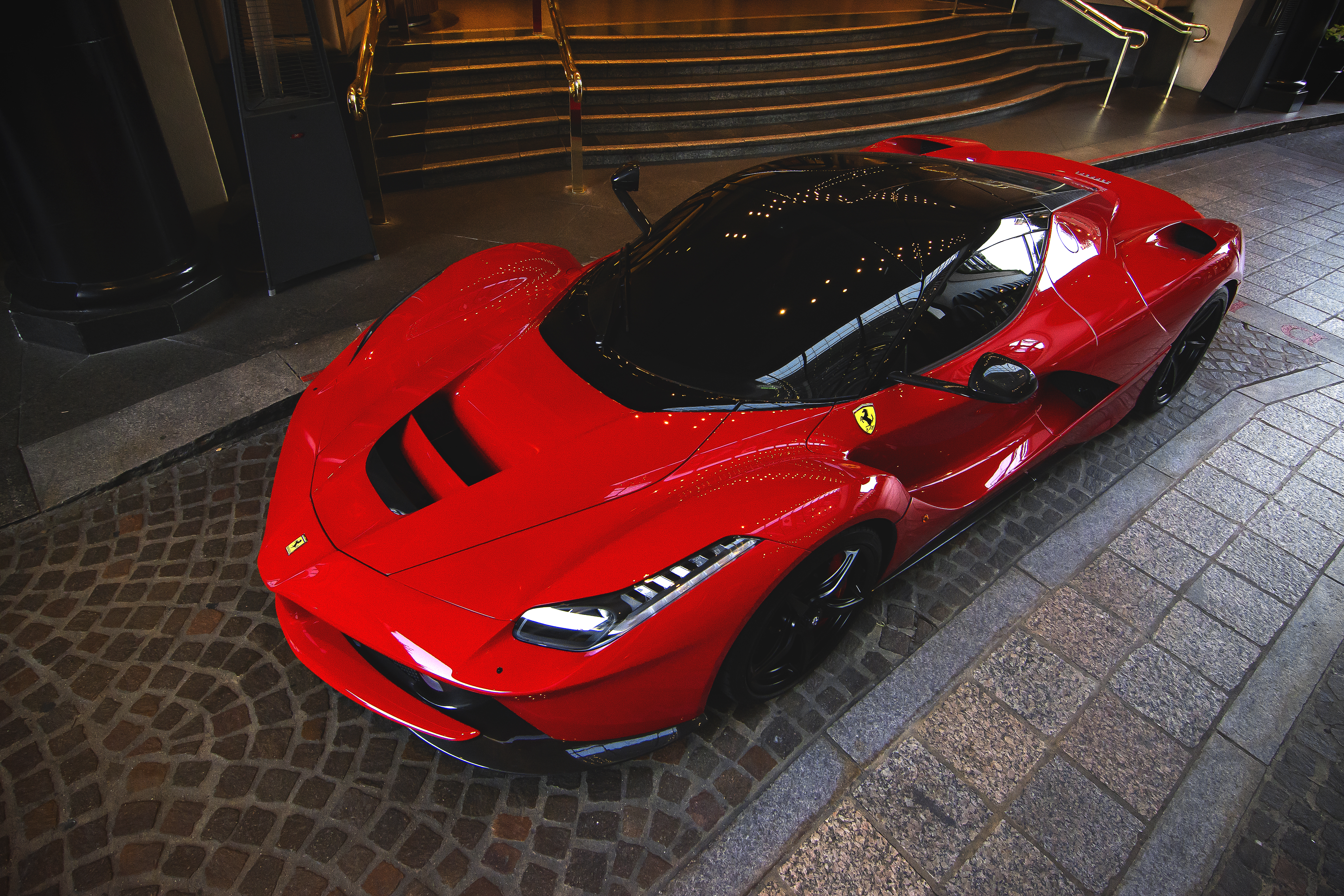 Ferrari LaFerrari in Beverly Hills